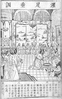 Edición y traducción china de las Evangelicae historiae imagines de Jerónimo Nadal.